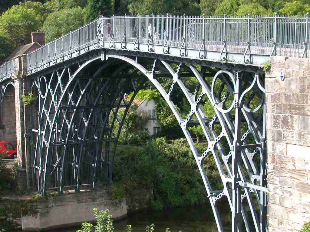 Ironbridge, erste Eisenbrücke der Welt 27.08.2006 1313113113113;j, k